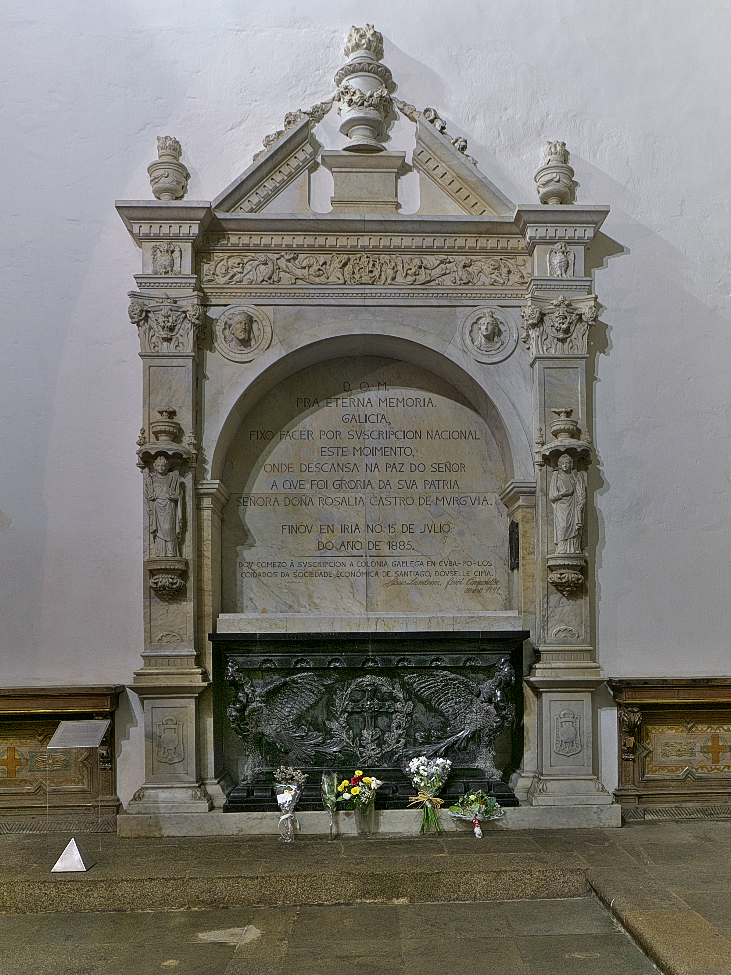 Capilla de la Visitación, iglesia del Convento de Santo Domingo de Bonaval. Obra escultórica de Jesús Landeira (1891).